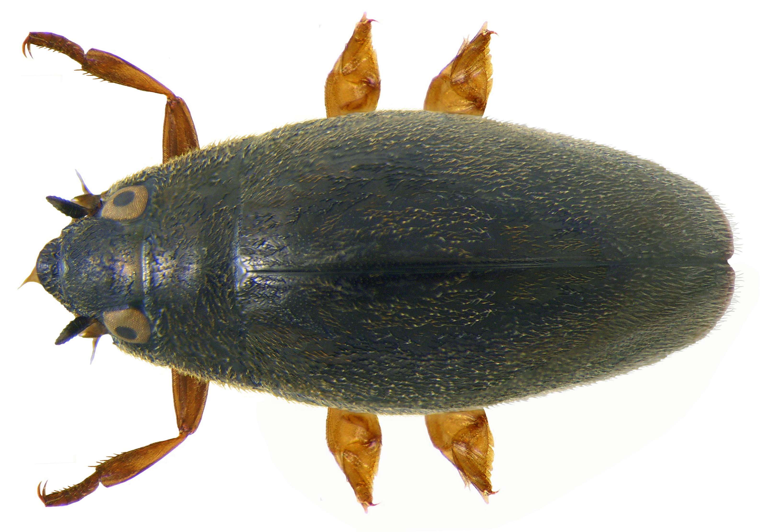 Orectochilus villosus (O.F.Mueller, 1776) Familie: Gyrinidae Grösse: 5-7 mm Fundort: England, Irland, Moyola leg.det. M.G.Telfer, 2008 Foto: U.Schmidt, 2009